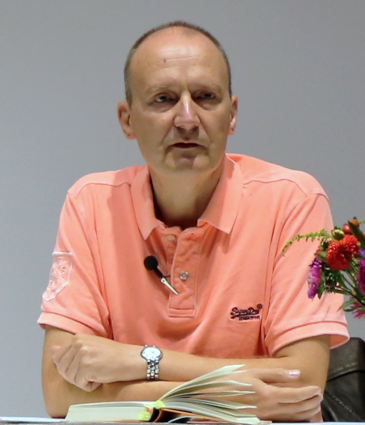 Lesung mit Thomas Brussig in der Stadtbibliothek Nordhausen